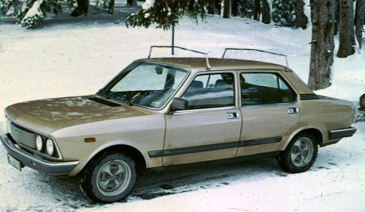 Fiat 132 in GR, gegenüber Heidsee zwischen Lenzerheide u. Valbella